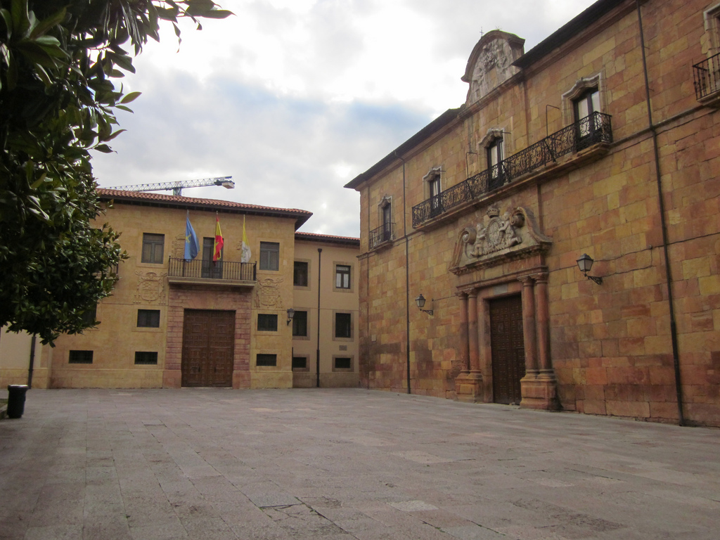 Corrada del Obispo, plaza de la ciudad de Oviedo, España. Al fondo el Palacio Episcopal y a la derecha la portada del Claustro de la Catedral de Oviedo, de estilo barroco, construida cuando se añadió un piso de ese mismo estilo al claustro gótico.